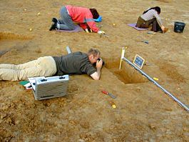 Ausgrabung Usingen E. Laufer